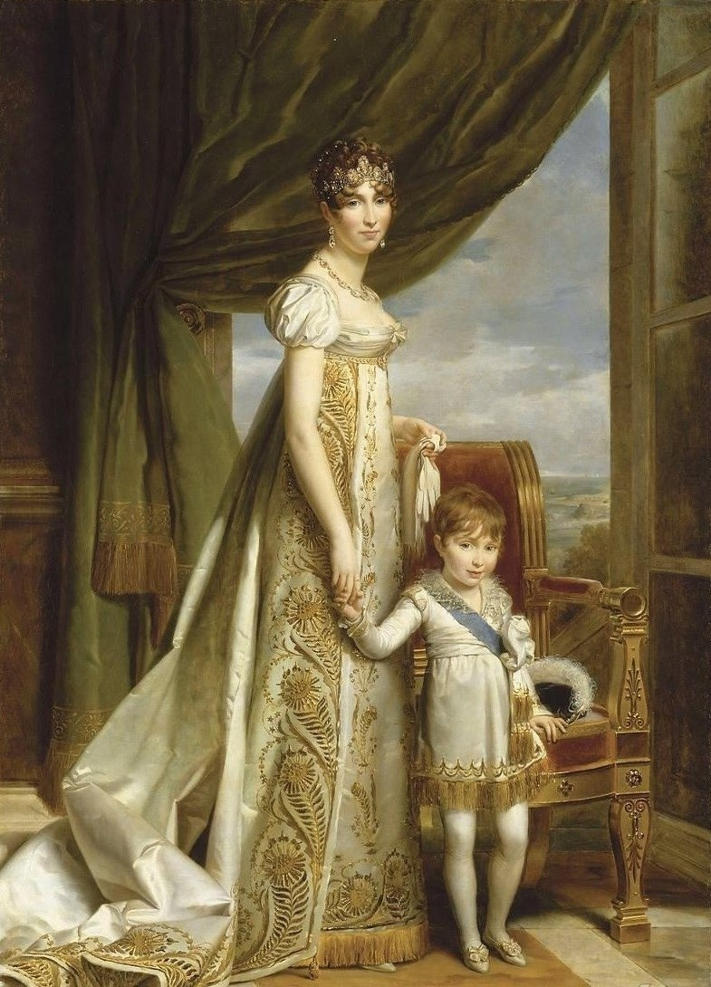 Koningin Hortense, echtgenote van Koning Lodewijk Napoleon